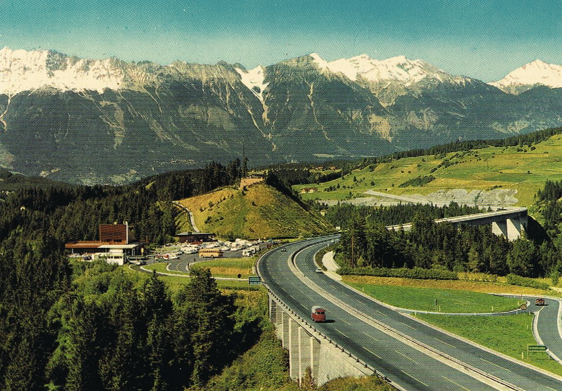 Vista del Ponte Europa